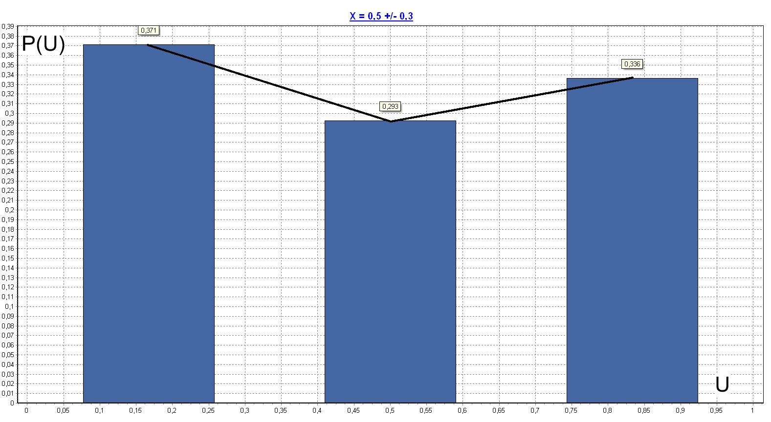 Величина, распределённая по равномерному закону